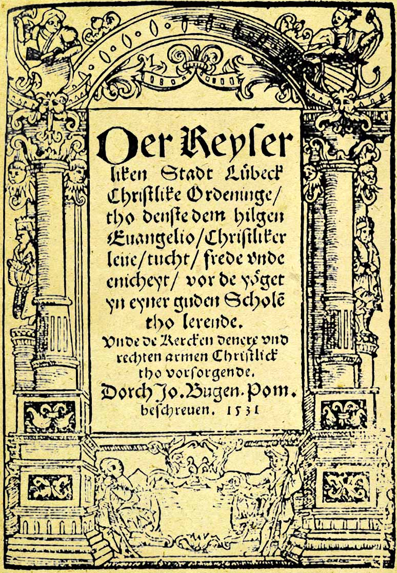 Johannes Bugenhagen: Lübecker Kirchenordnung, 1531, scan of title page